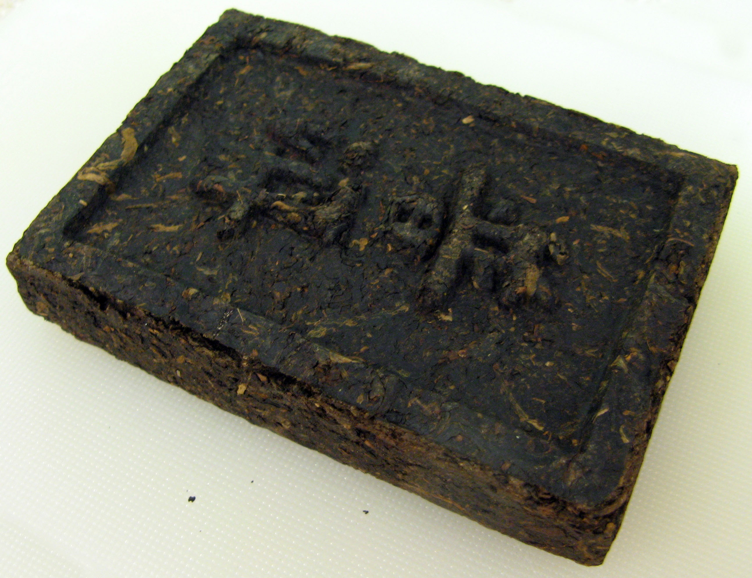 Чай пуэр. Кирпичик